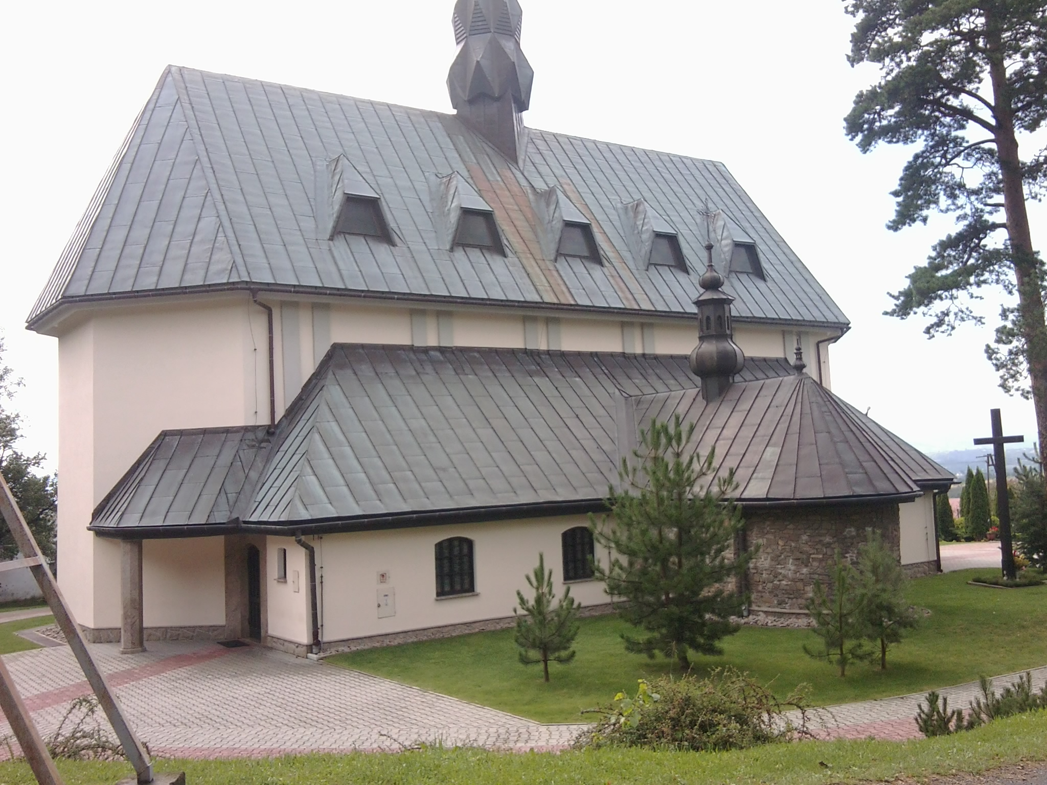 Kościół Podwyższenia Krzyża Świętego w Brzeznej-Strzygańcu